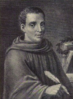 Agnolo Firenzuola nem hiteles portréja az 1802-es milanói kiadásból.